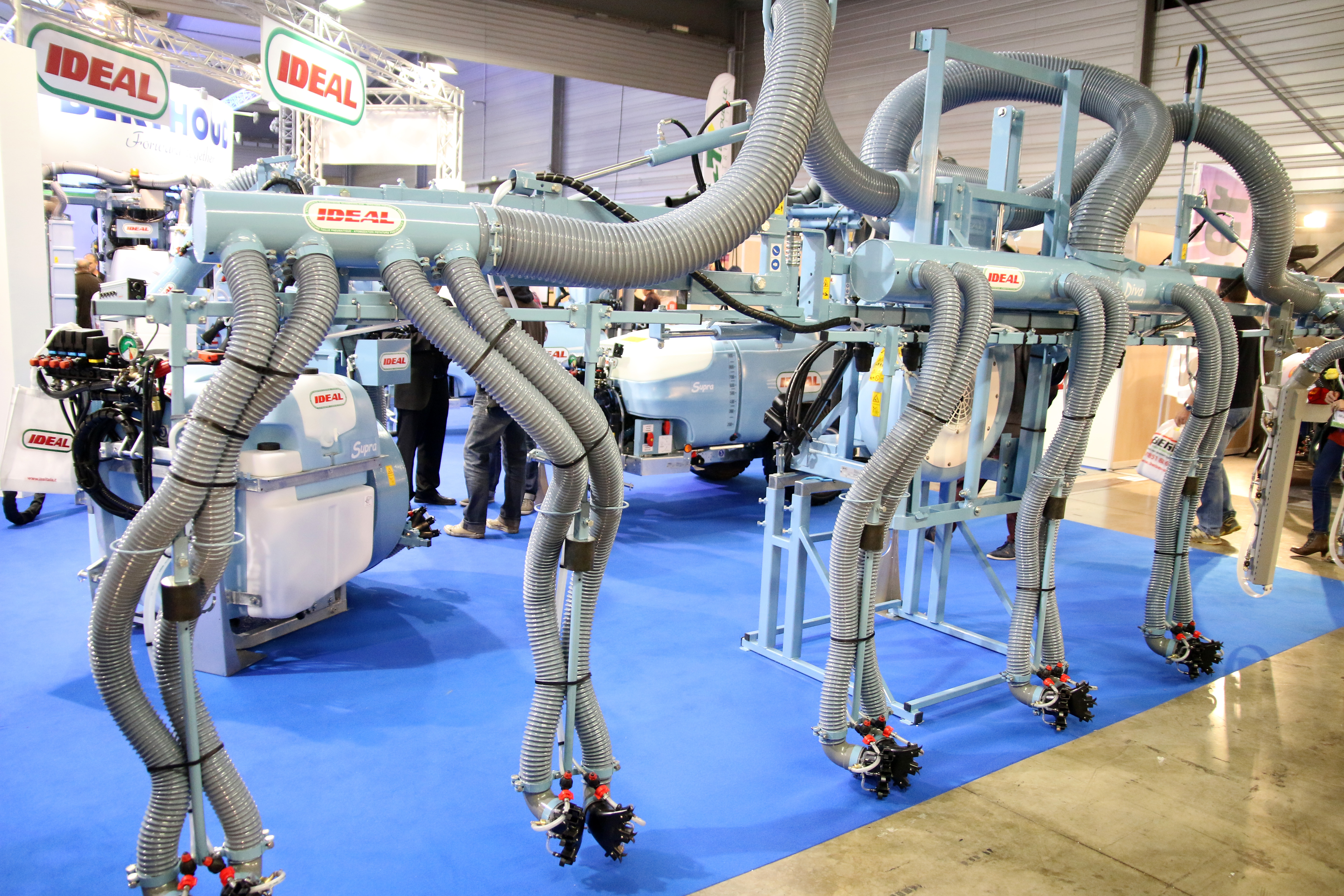 Rampes de pulvérisateur, portée sur six rangs de vigne